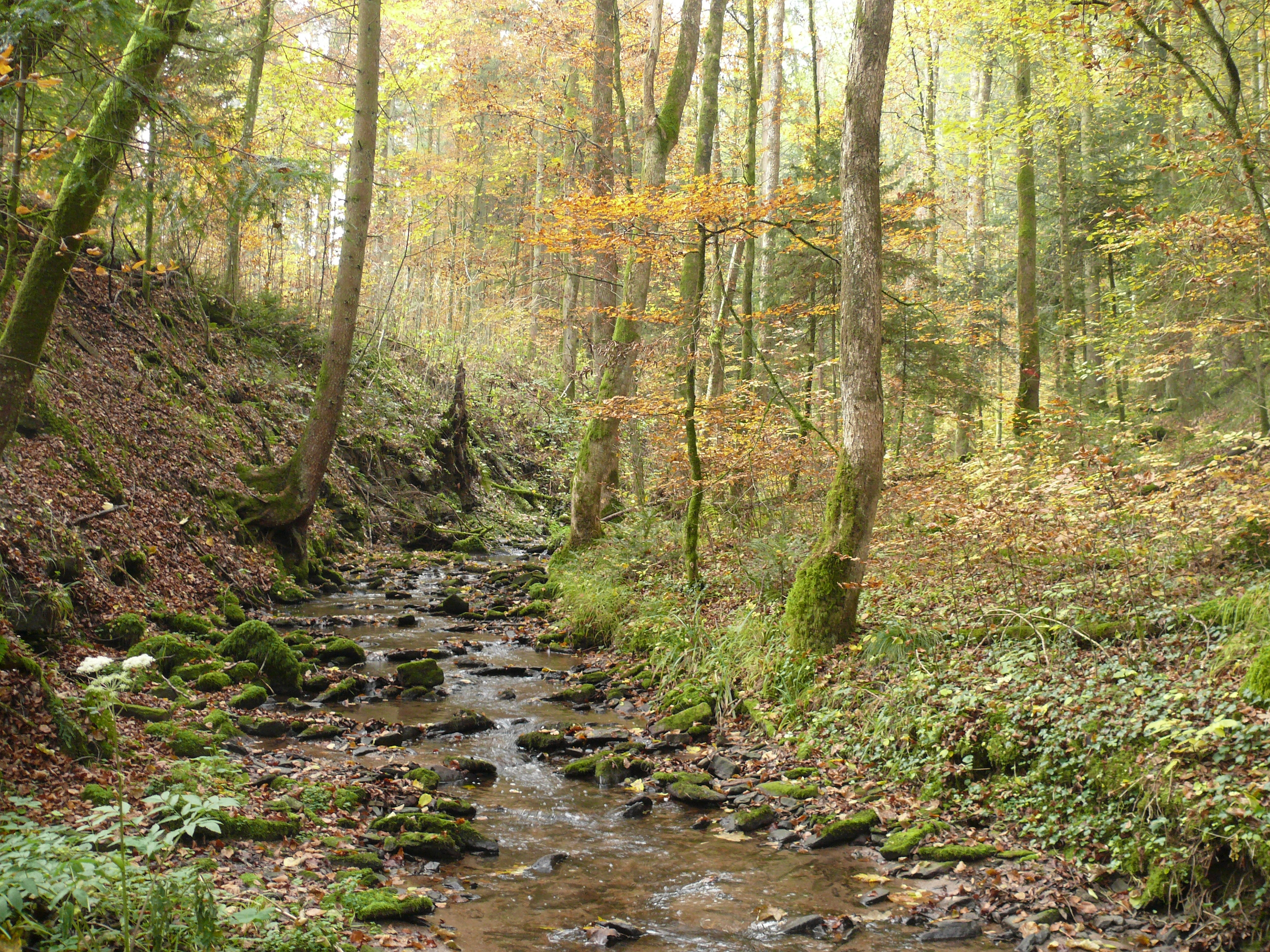 Rauhenzainbach bei Fichtenberg